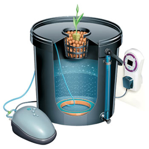 DWC или Deep Water Culture – это простой и гениальный вид гидропонных систем, состоящий из бака и устройства для аэрации воды. Корни погружают в питательный раствор, а воздушный компрессор обогащает его кислородом